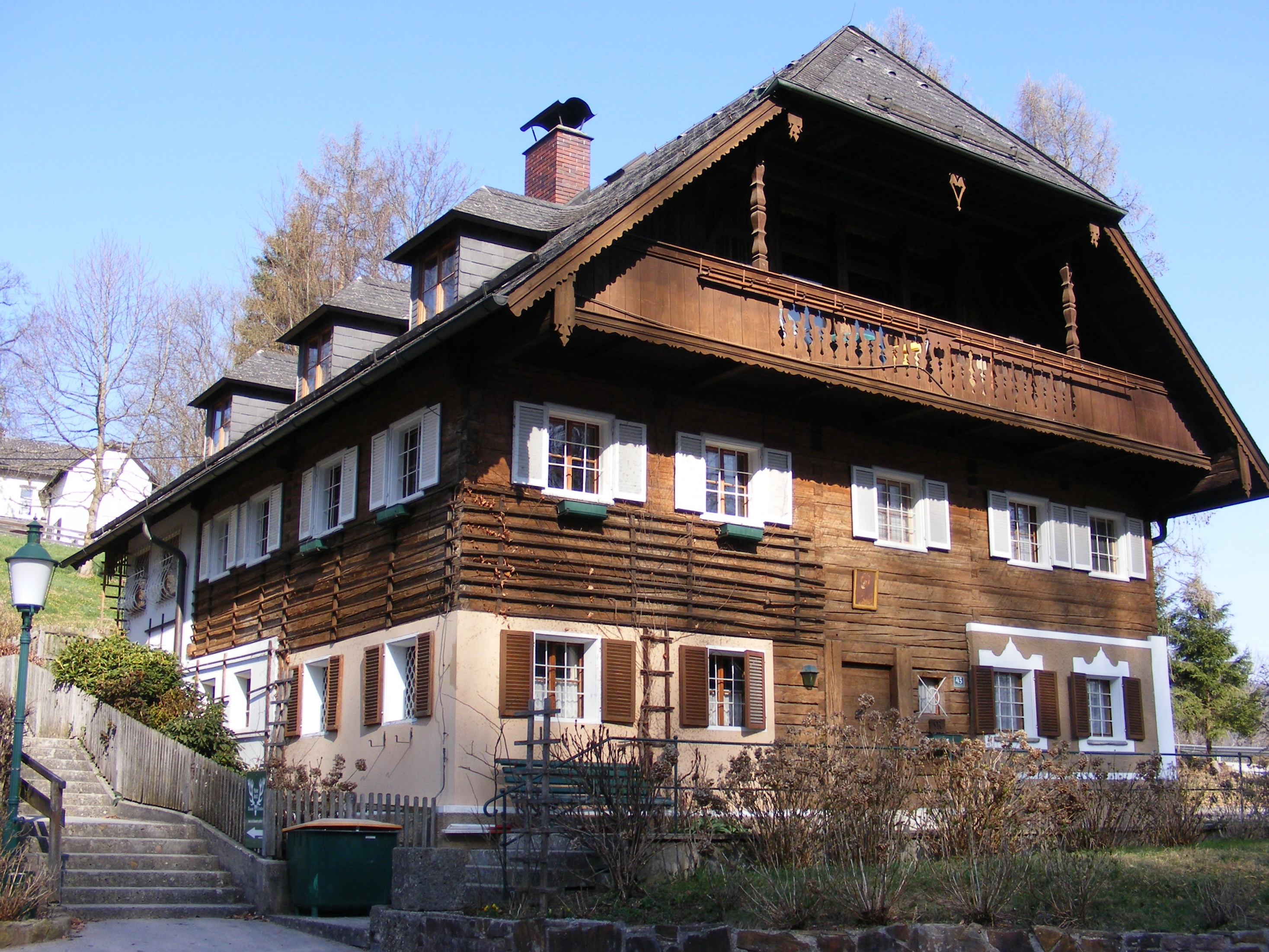 Das Bindergütl nächst der Wallfahrtskirche Maria Plain auf dem Plainberg, Gemeinde Bergheim, Land Salzburg